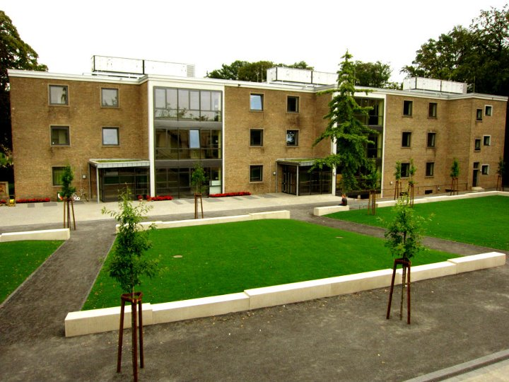 Blick auf den 2011 neu gestalteten "Campus" und den 2010 renovierten "Klassentrakt" der Angelaschule Osnabrück